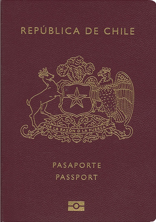 Portada del pasaporte biométrico actual, vigente desde 2013